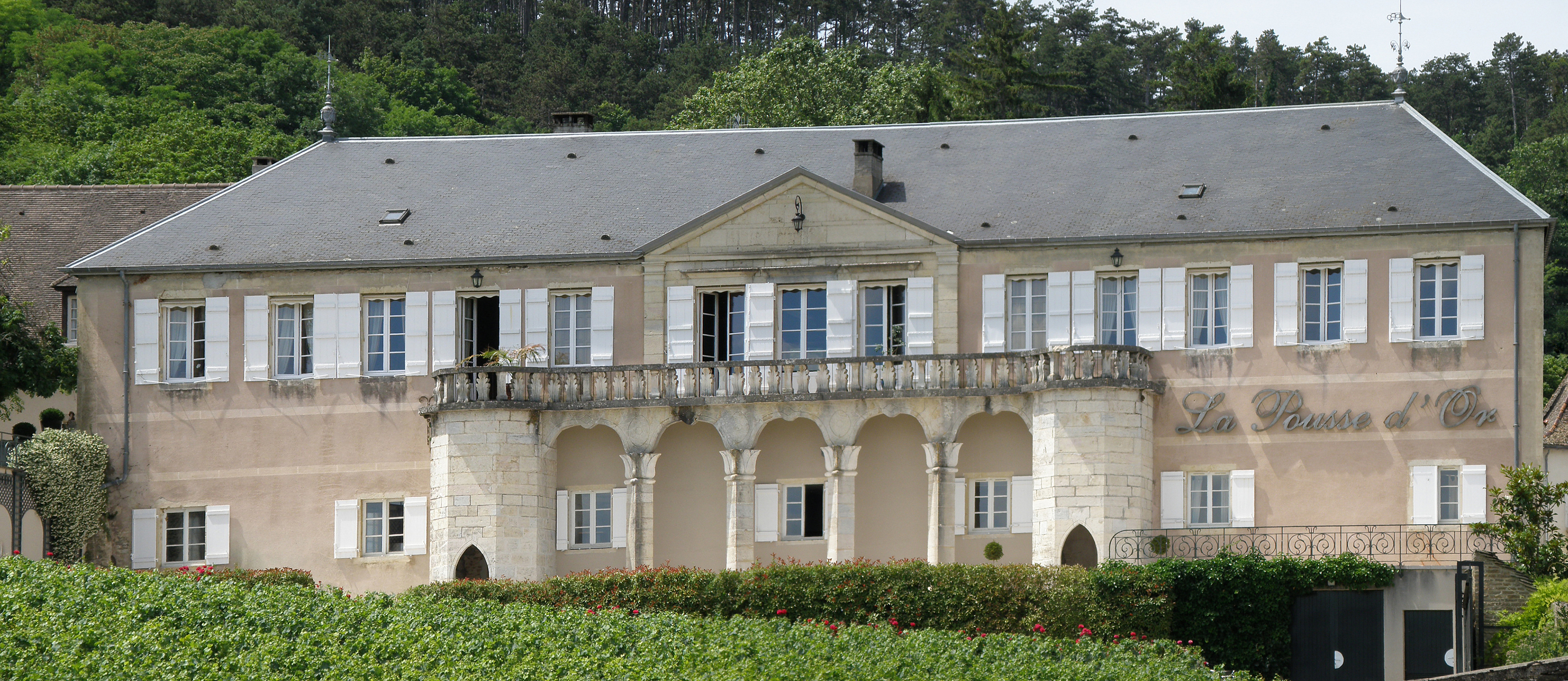 Volnay (Côte-d'Or, Bourgogne, France). Domaine viticole de la Pousse d'or, rue de la Chapelle.